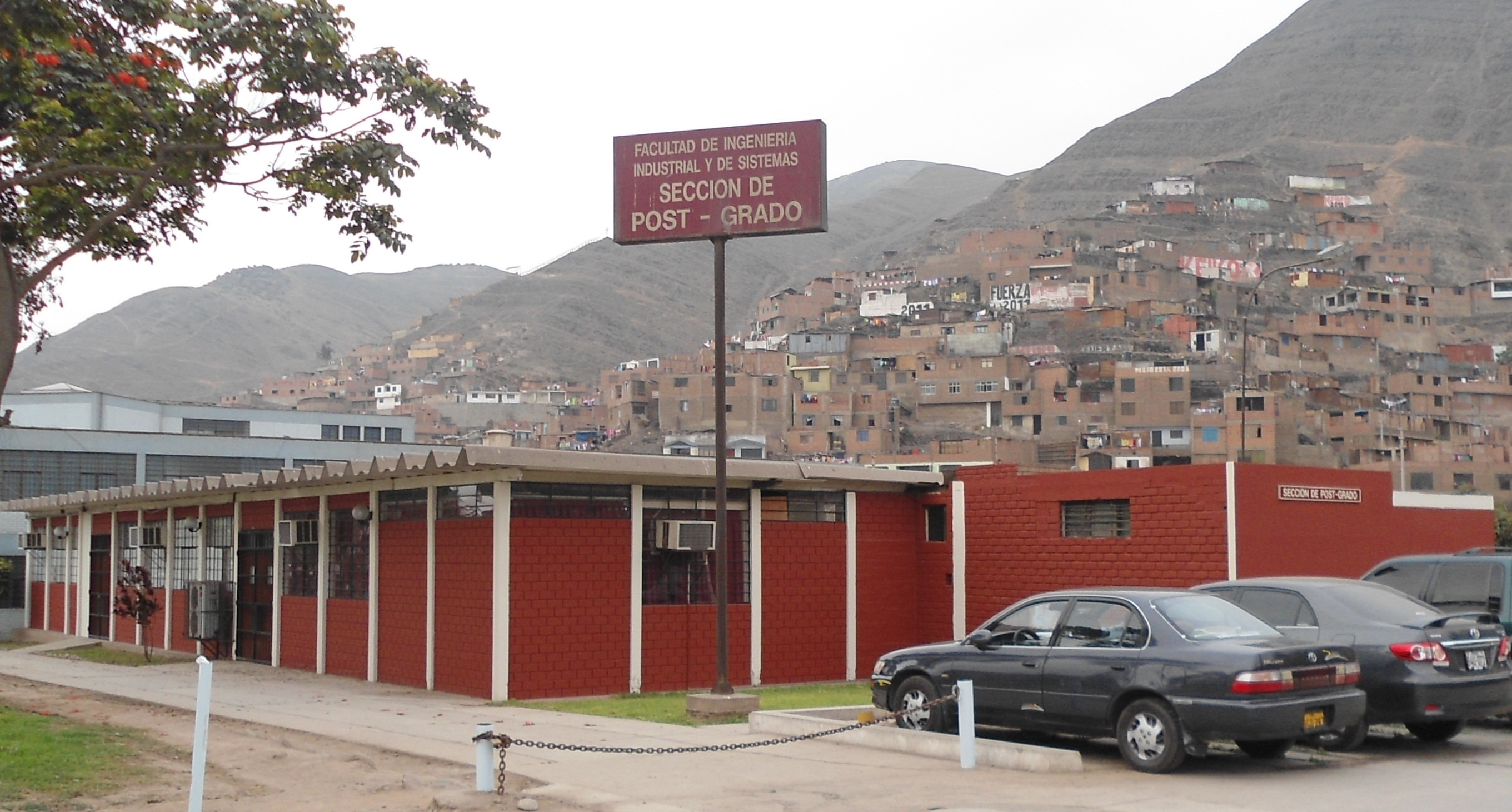 Foto de la Sección de Postgrado de la Fiis Uni.